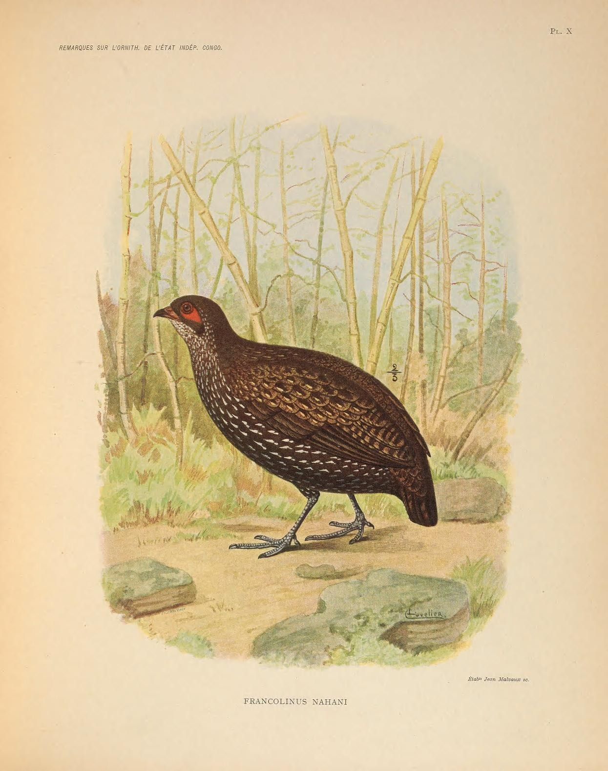 REMARQUES SUR L'ORNITH. DE L'ETAT INDEP. CONGO. Pl. X 4 Étab'« Jean Malvaux sa. FRANCOLINUS NAHANI